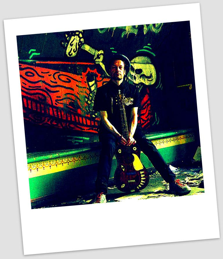 Photo by Nalle Westman